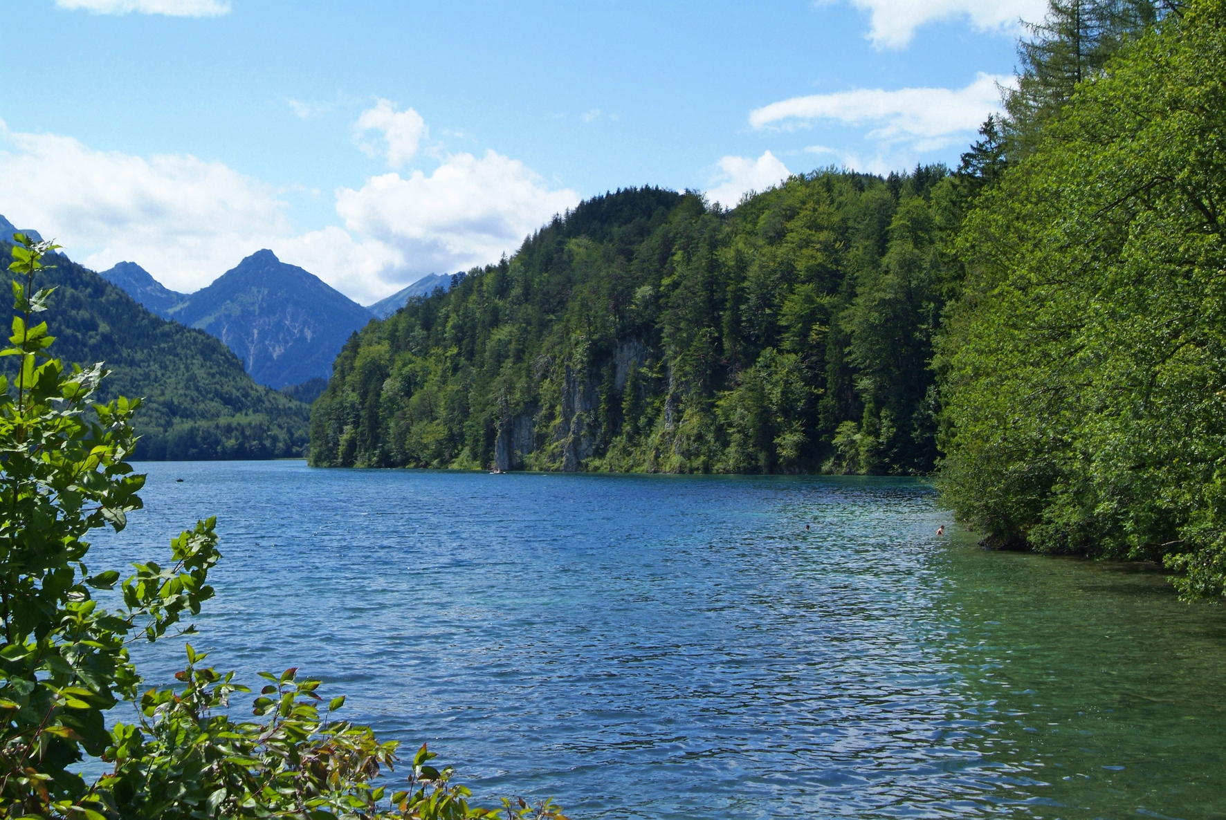 Alpsee